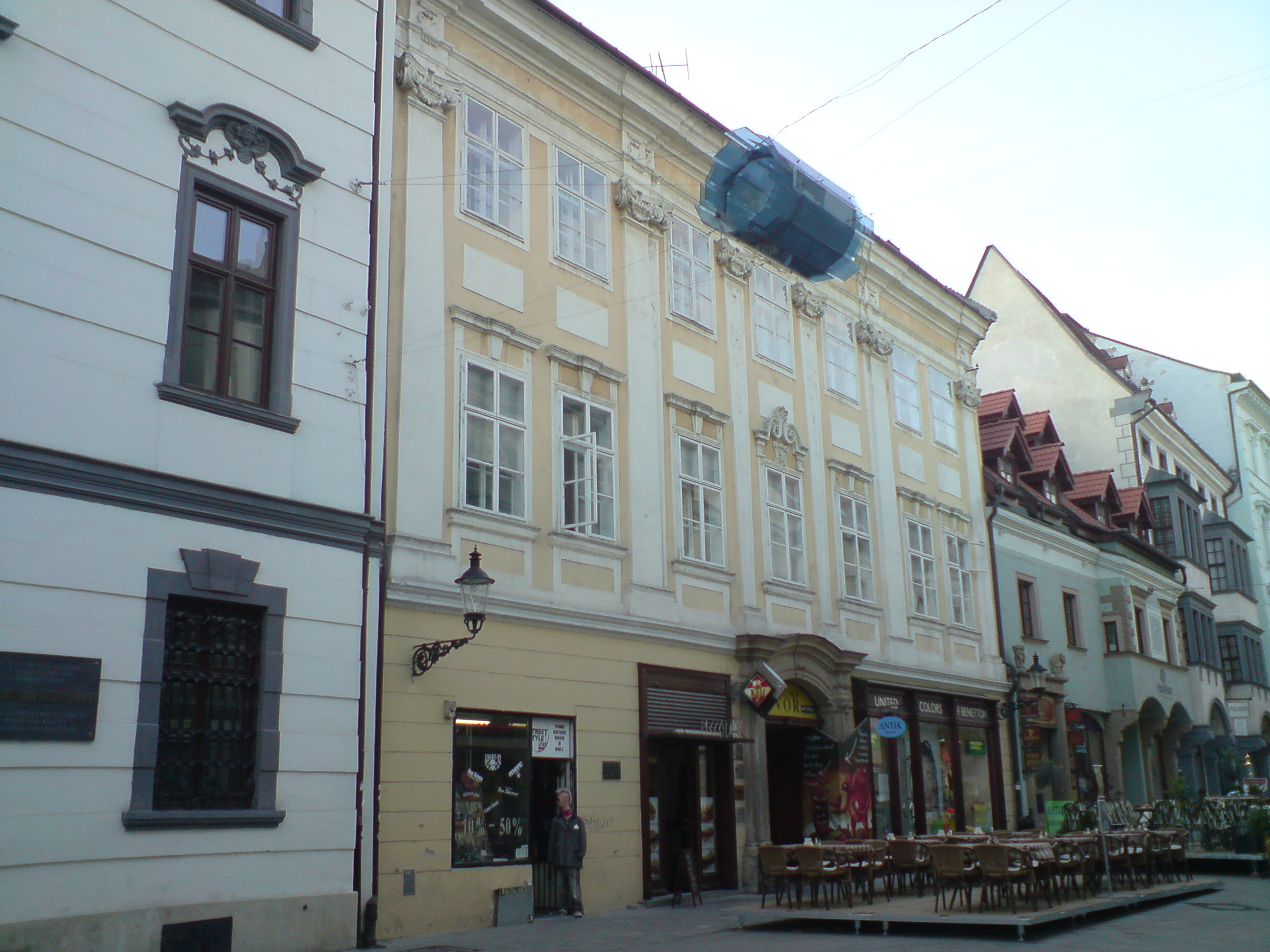 Jesenákov palác, Michalská, Bratislava